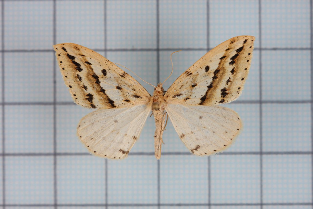 Loxaspilates densihastigera Inoue,1983 粗斑尖黃尺蛾 台灣尺蛾科圖鑑2:P.305 female